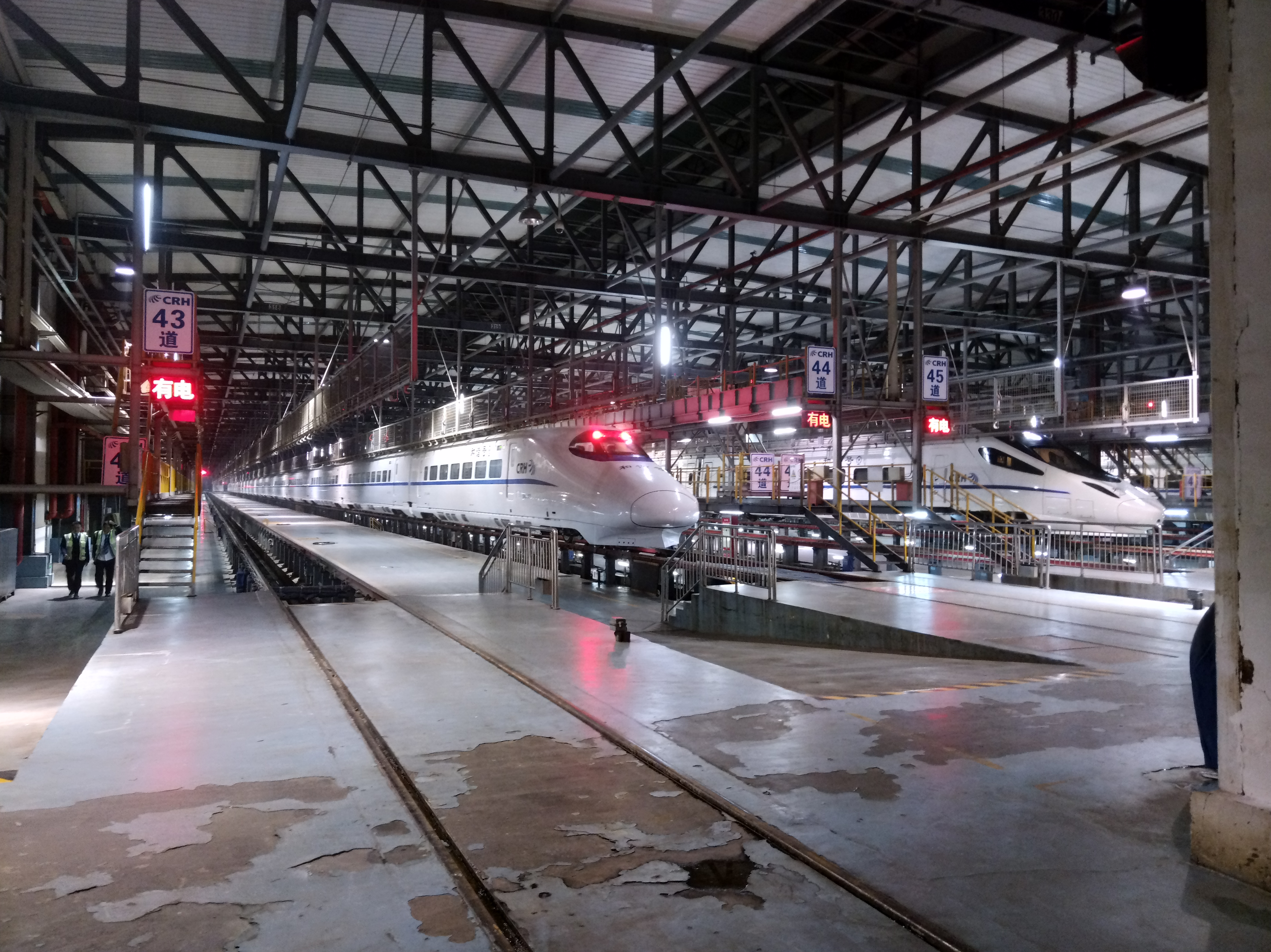 武汉动车段汉口动车运用车间检修库